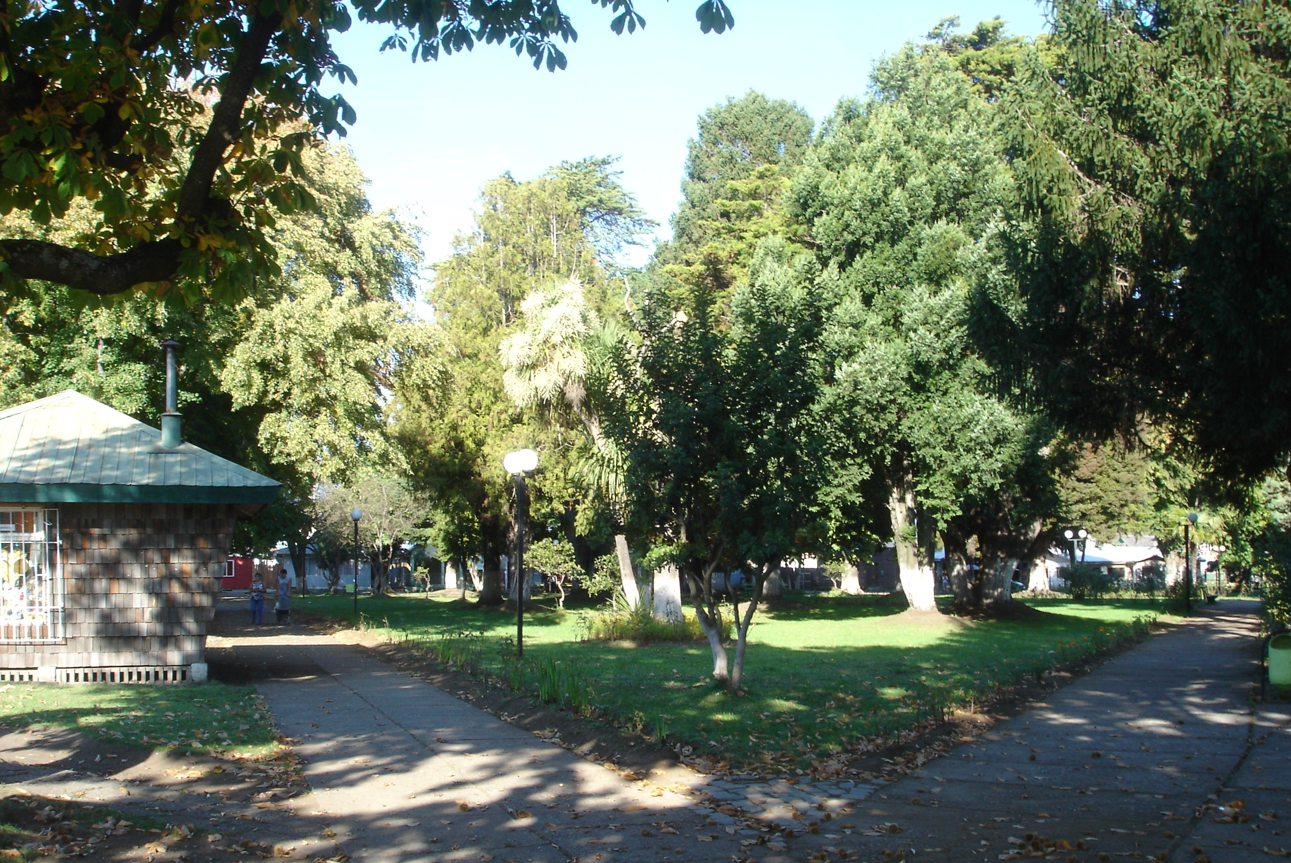 Vista del centro de Cunco.